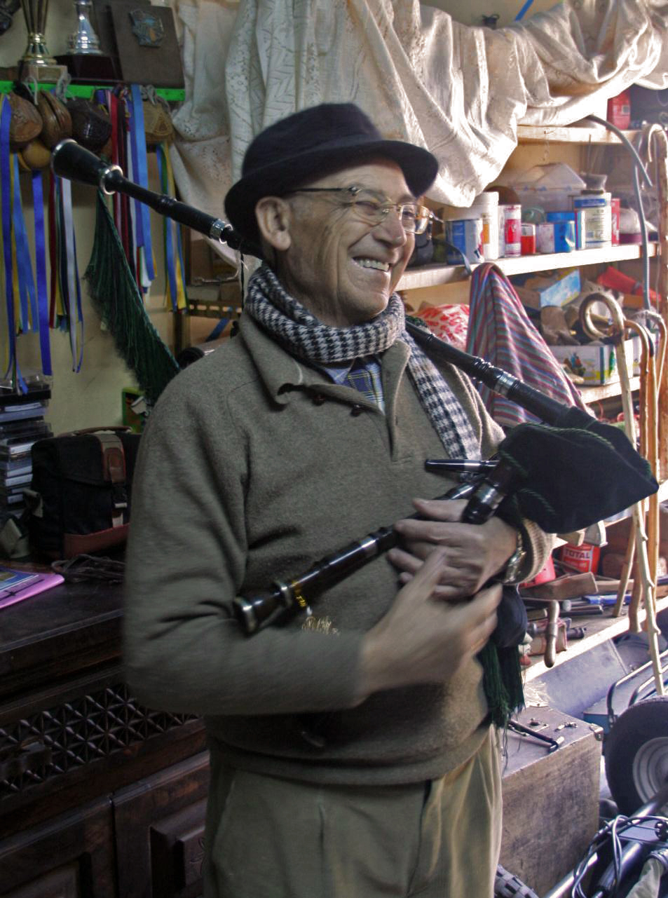 Moisés Liébana, gaitero leonés de la comarca de Cabrera.